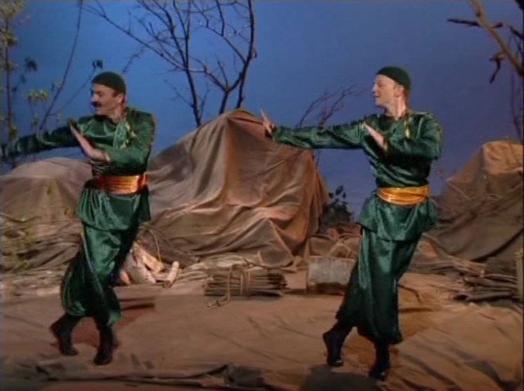 Танец "Шалахо" в исполнении азербайджанского танцора Ханлар Баширов